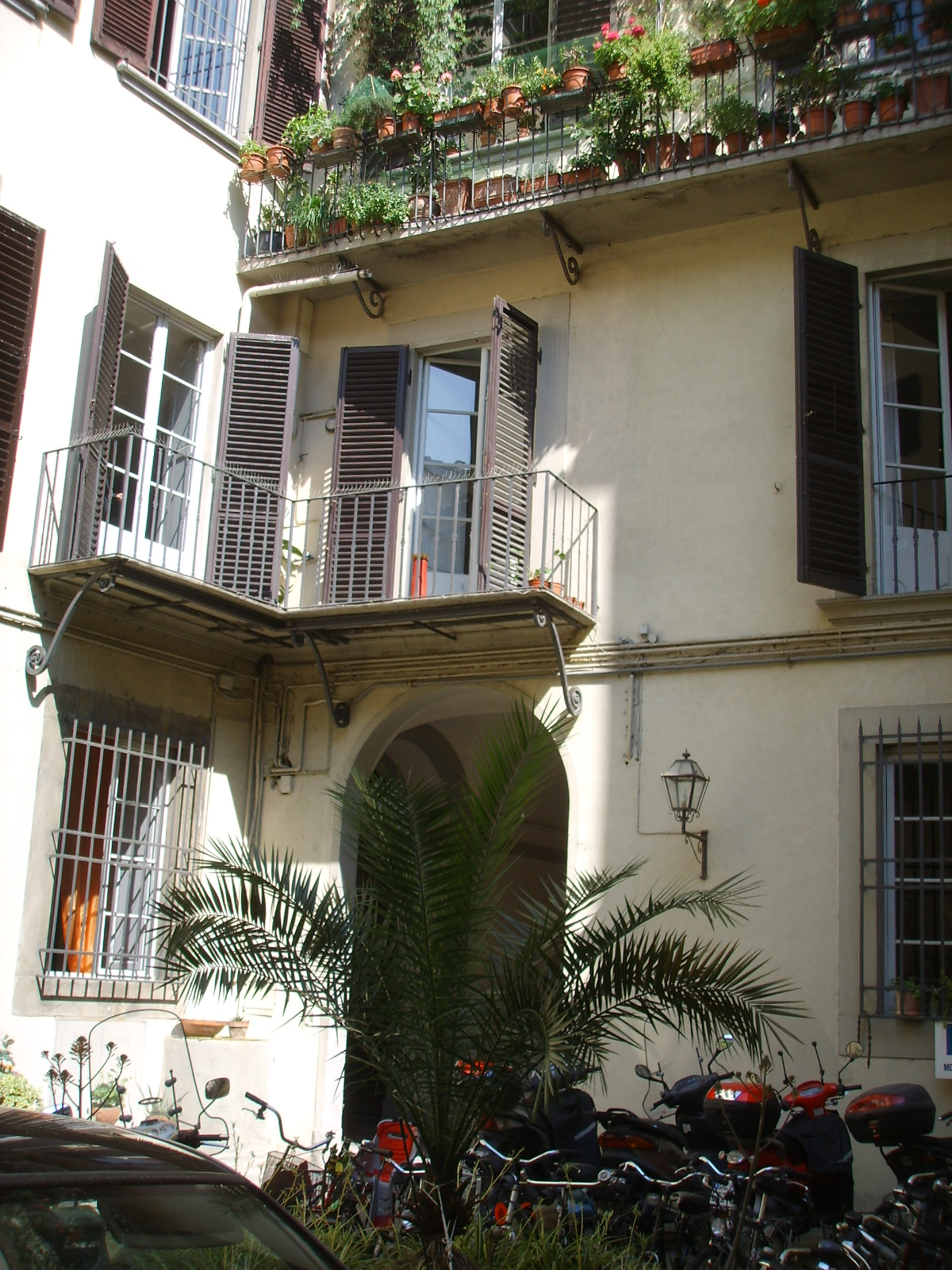 Palazzo peruzzi (via de' Rustici), retro